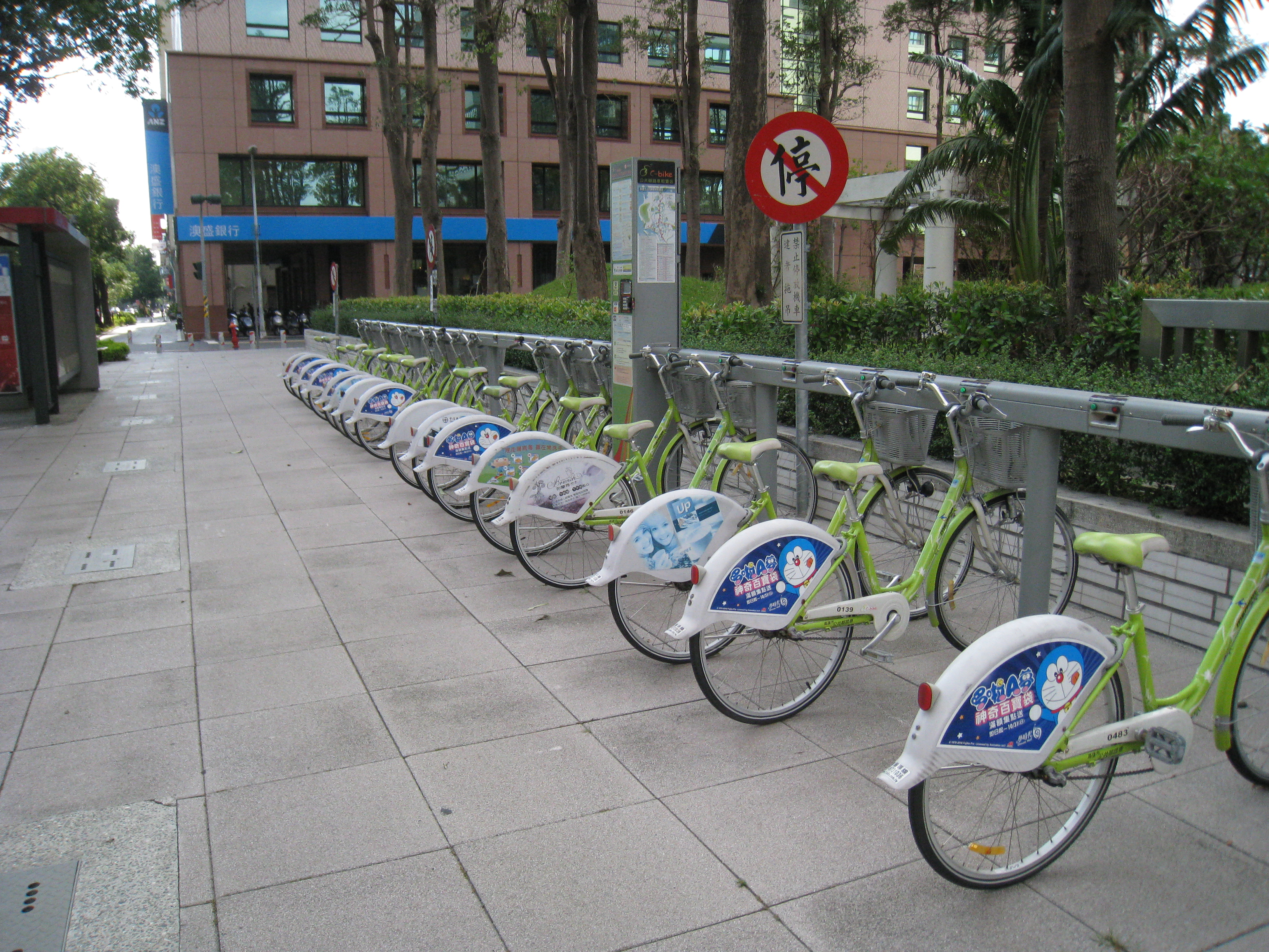 高雄市公共腳踏車租賃系統市政府站